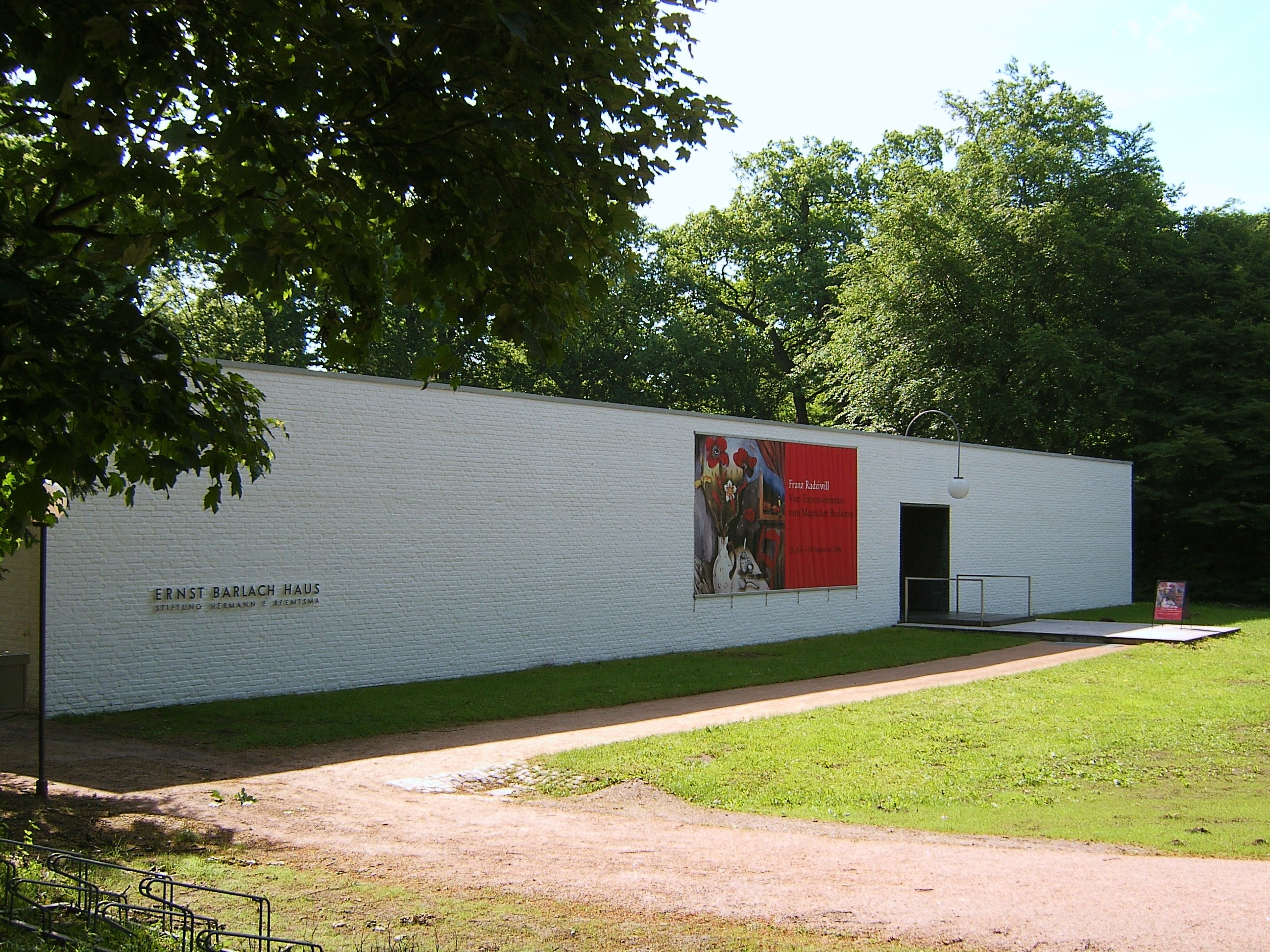 Bildbeschreibung: Hamburg, Jenischpark, Ernst-Barlach-Haus Fotograf: selbst Datum: 2.6.2006